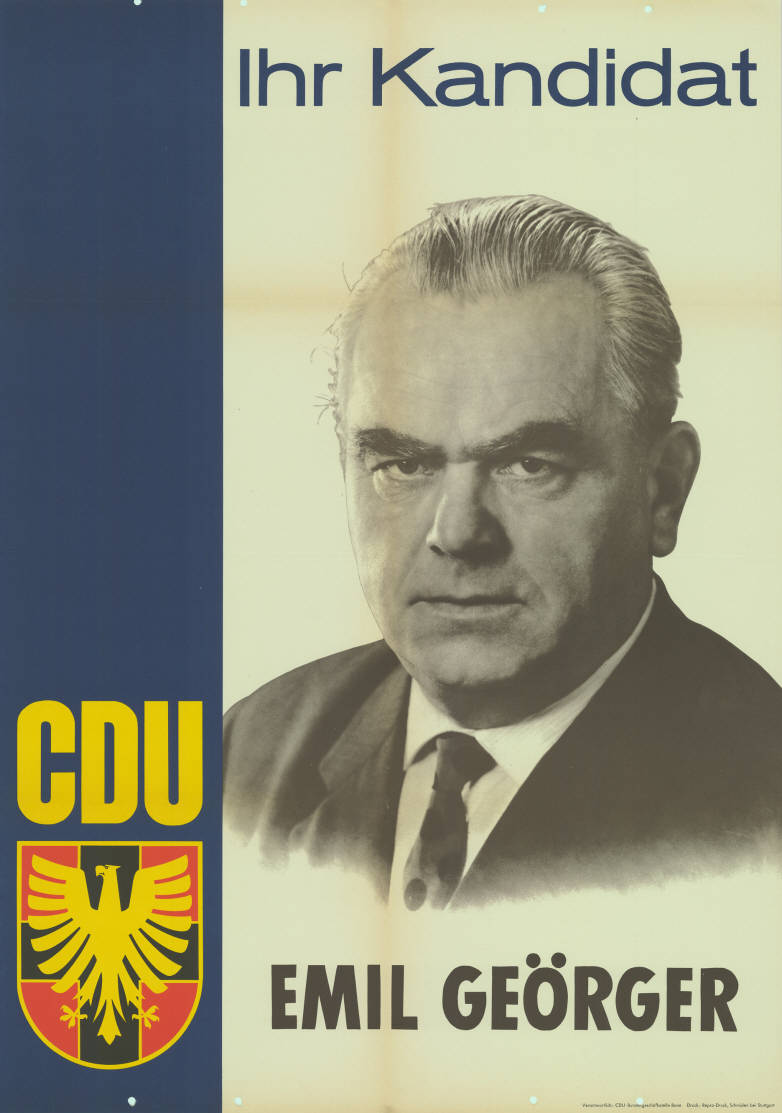 Ihr Kandidat CDU Emil Geörgerer Abbildung: Porträtfoto Plakatart: Kandidaten-/Personenplakat mit Porträt Auftraggeber: Verantw.: CDU-Bundesgeschäftsstelle Bonn Drucker_Druckart_Druckort: Repro-Druck, Schmiden bei Stuttgart Objekt-Signatur: 10-010 : 218 Bestand: Landtagswahlplakate Rheinland-Pfalz (10-010) GliederungBestand10-18: Landtagswahlplakate Rheinland-Pfalz (10-010) » CDU Lizenz: KAS/ACDP 10-010 : 218 CC-BY-SA 3.0 DE